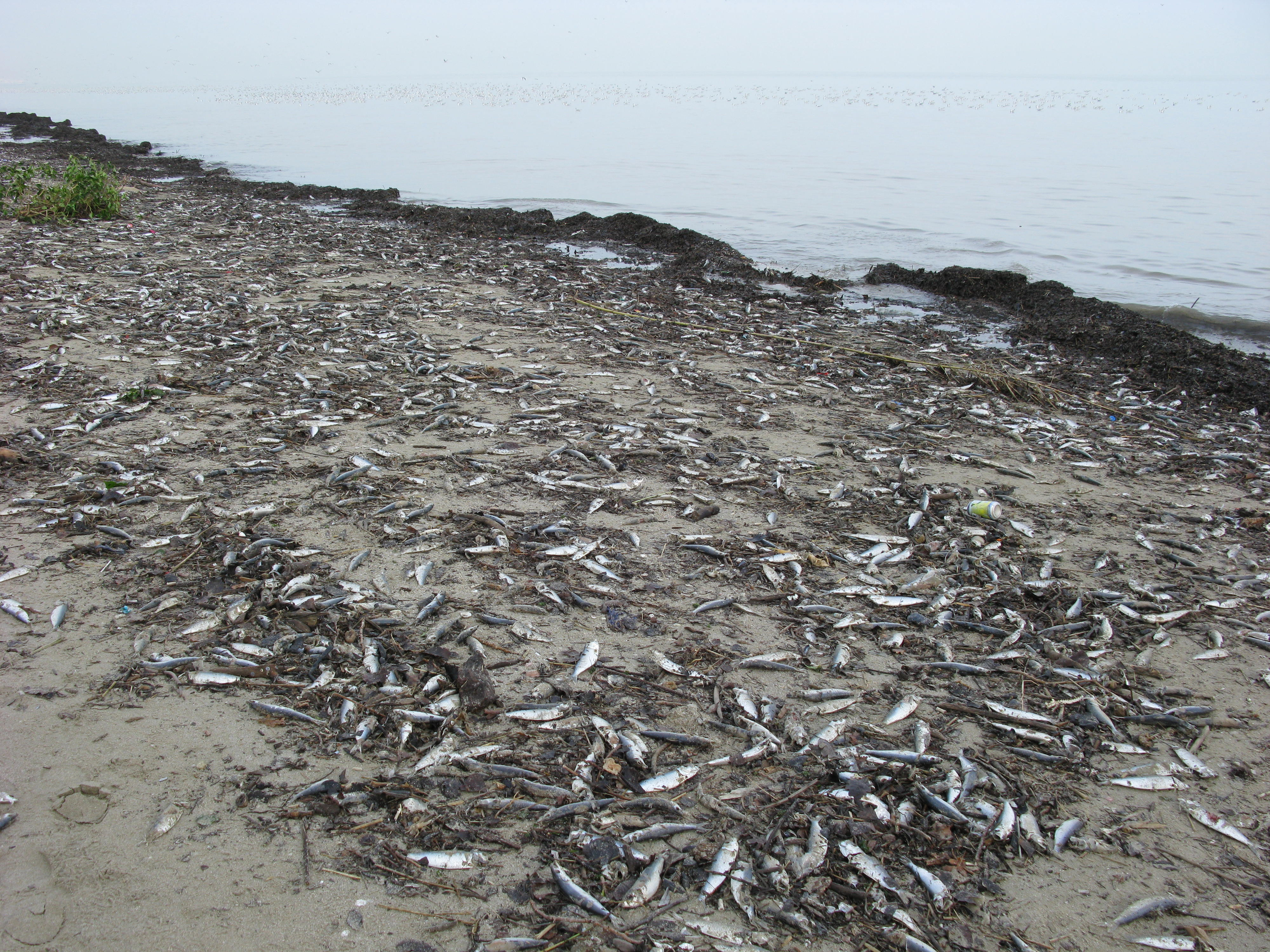 Moria di alacce (sardinella aurita) avvenuta nell'Adriatico nord-occidentale per il freddo inverno del 2010.